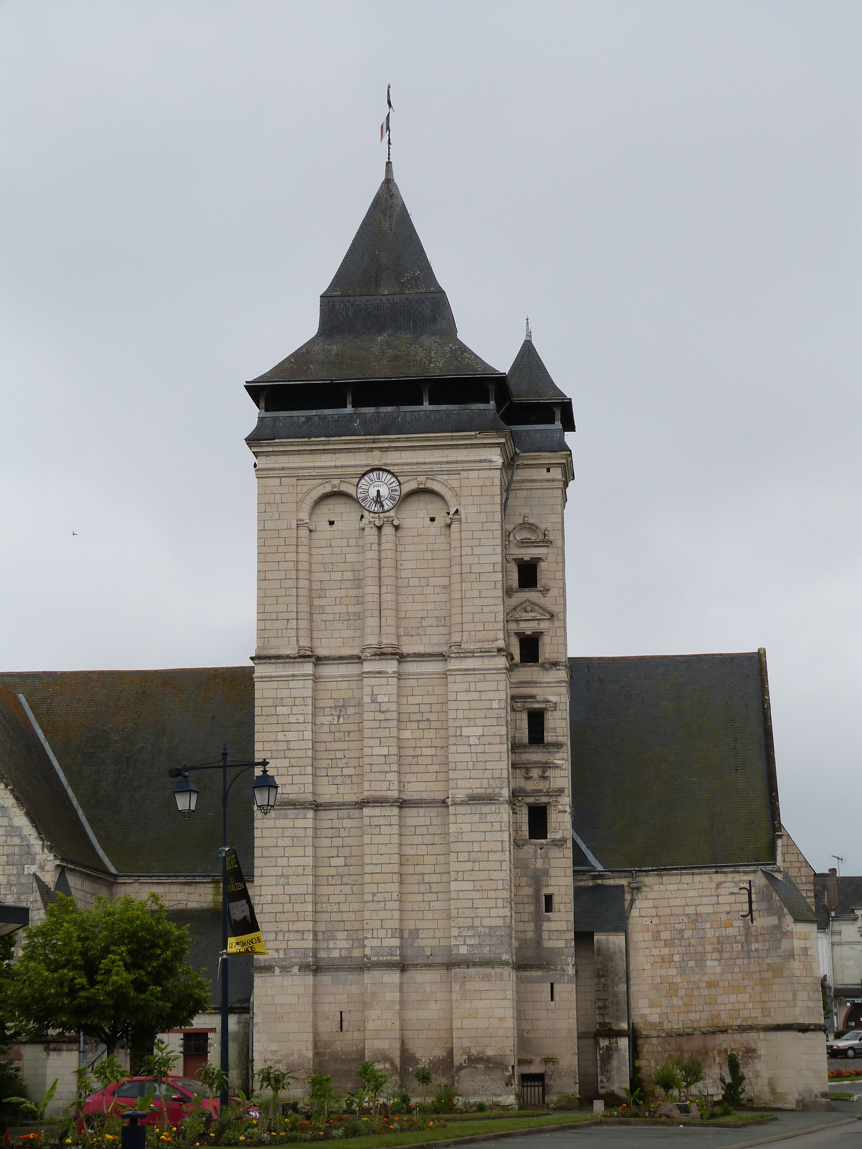 Église Notre-Dame (ClasséInscrit)